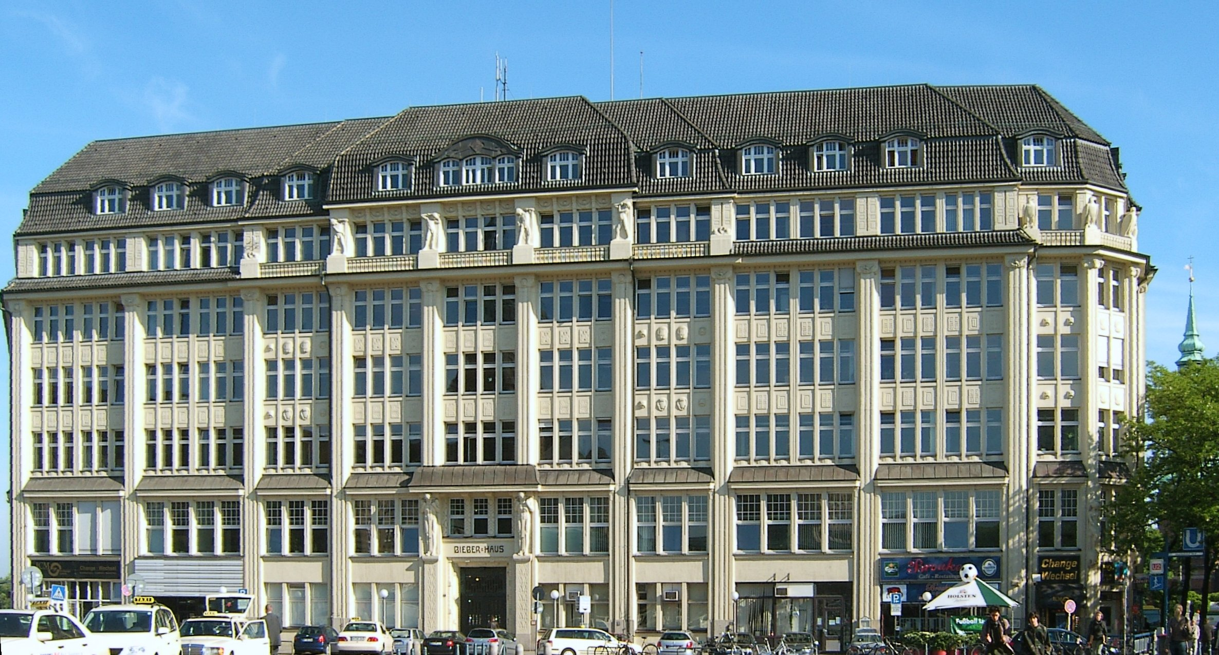 Hamburg, St. Georg, Bieberhaus. Erbaut von Rambatz & Jollasse. This is a photograph of an architectural monument.